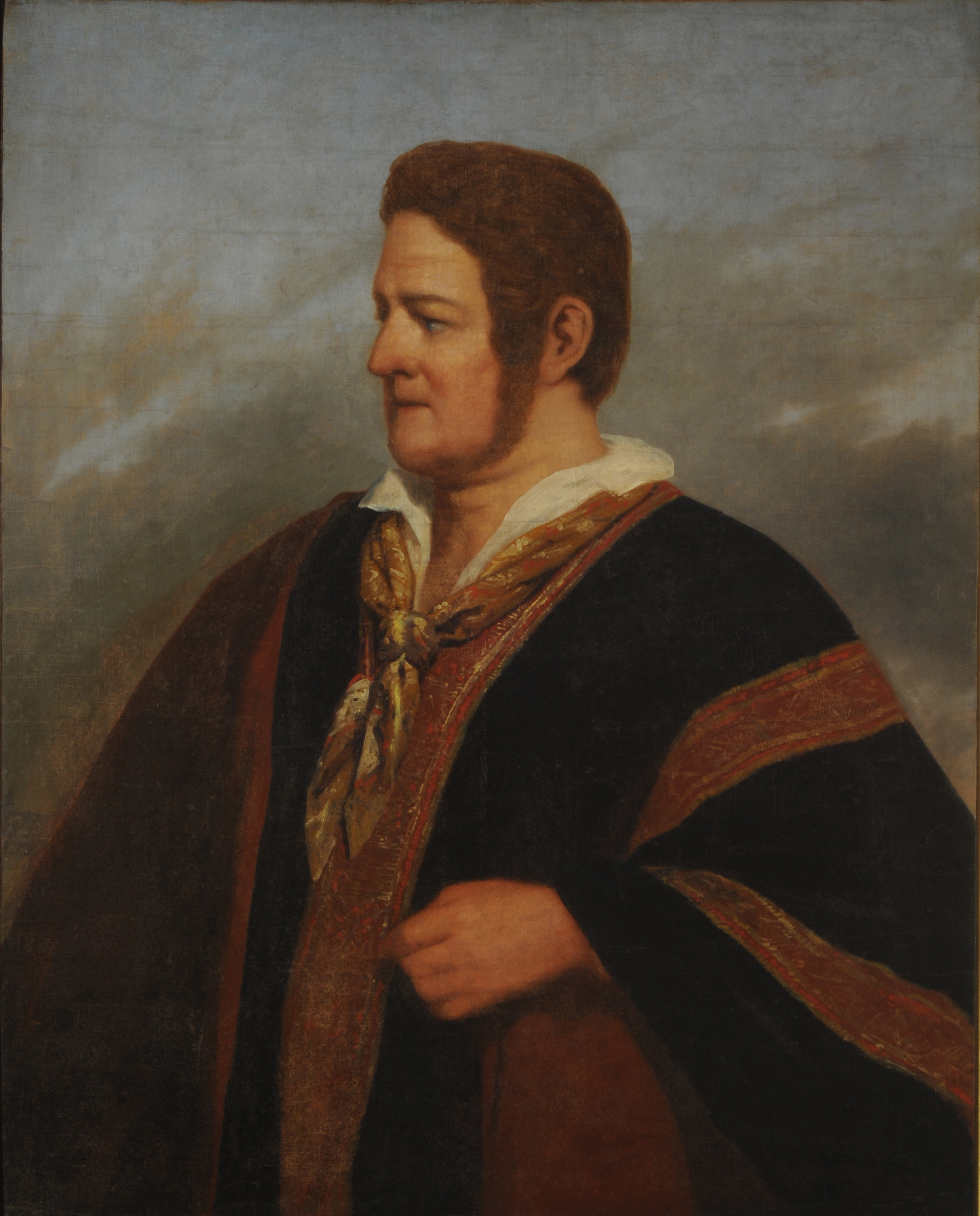 Raymond Auguste Quinsac Monvoisin, Retrato de Juan Manuel de Rosas. 1842. 100 x 79,8 cm, óleo sobre tela. Inv. 1913.